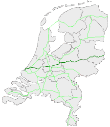 Locatie E30 in Nederland, zelf gemaakt